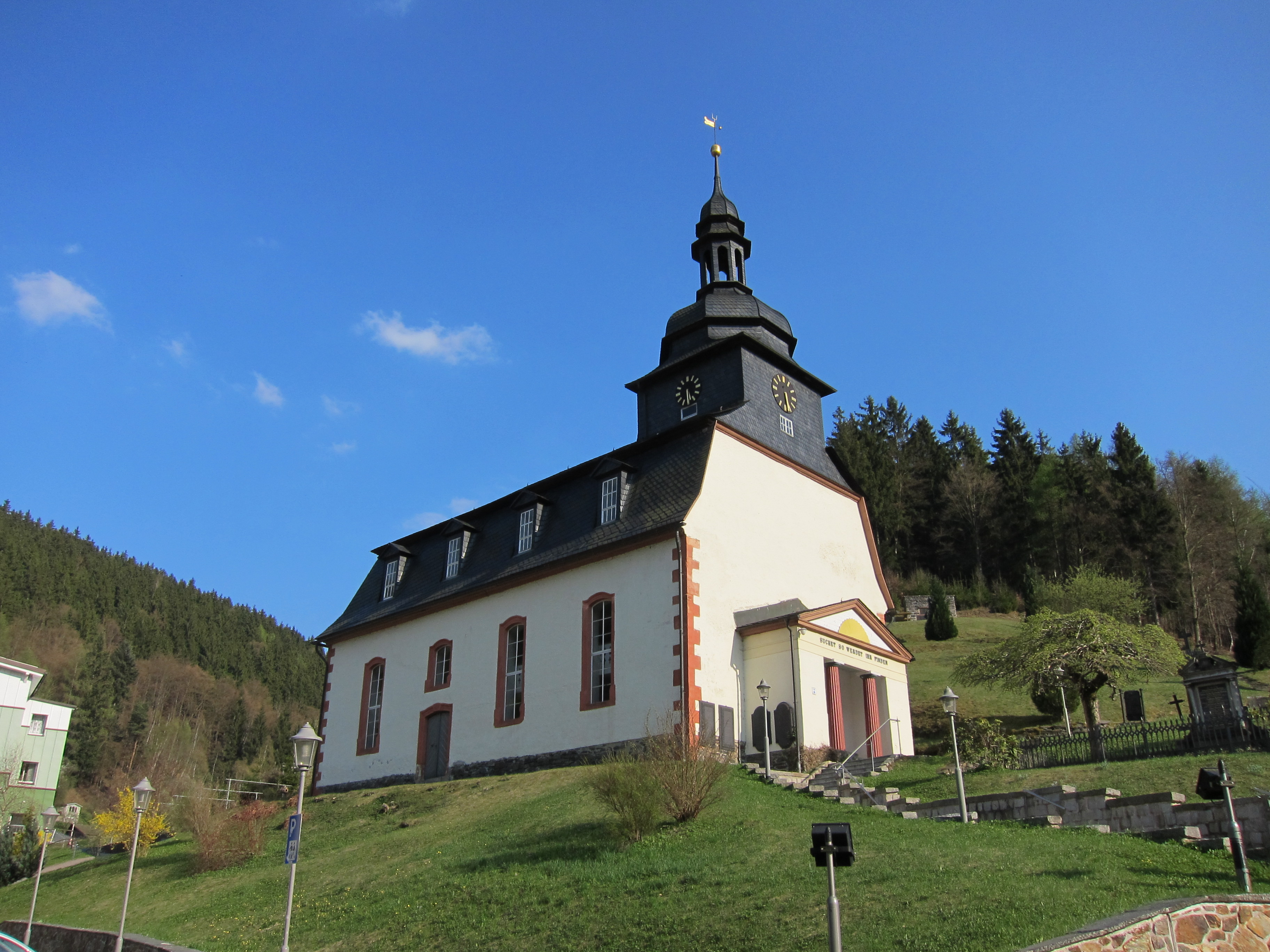 Johann Wolfgang Hammann ließ diese Kirche 1756 im Stil des Bauernbarock errichten.